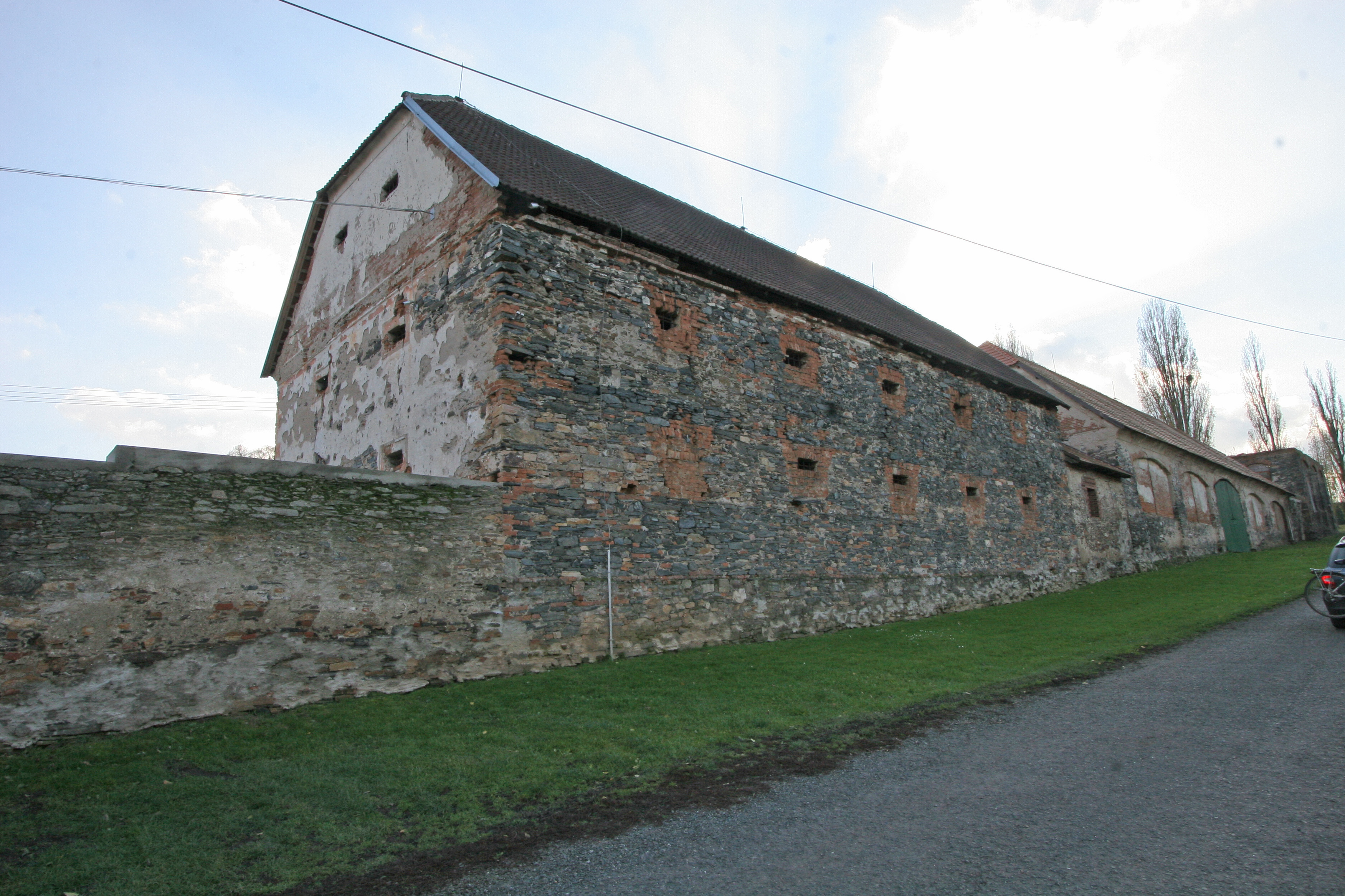 Auerspergský zemědělský dvůr (Markovice), Markovice 93